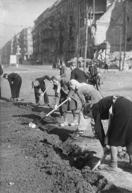 ADN-ZB/Donath Berlin Der Baltenplatz (umbenannt in Bersarinplatz) wird von der Schuljugend in Gemüseland umgewandelt. Aufn. März 1946